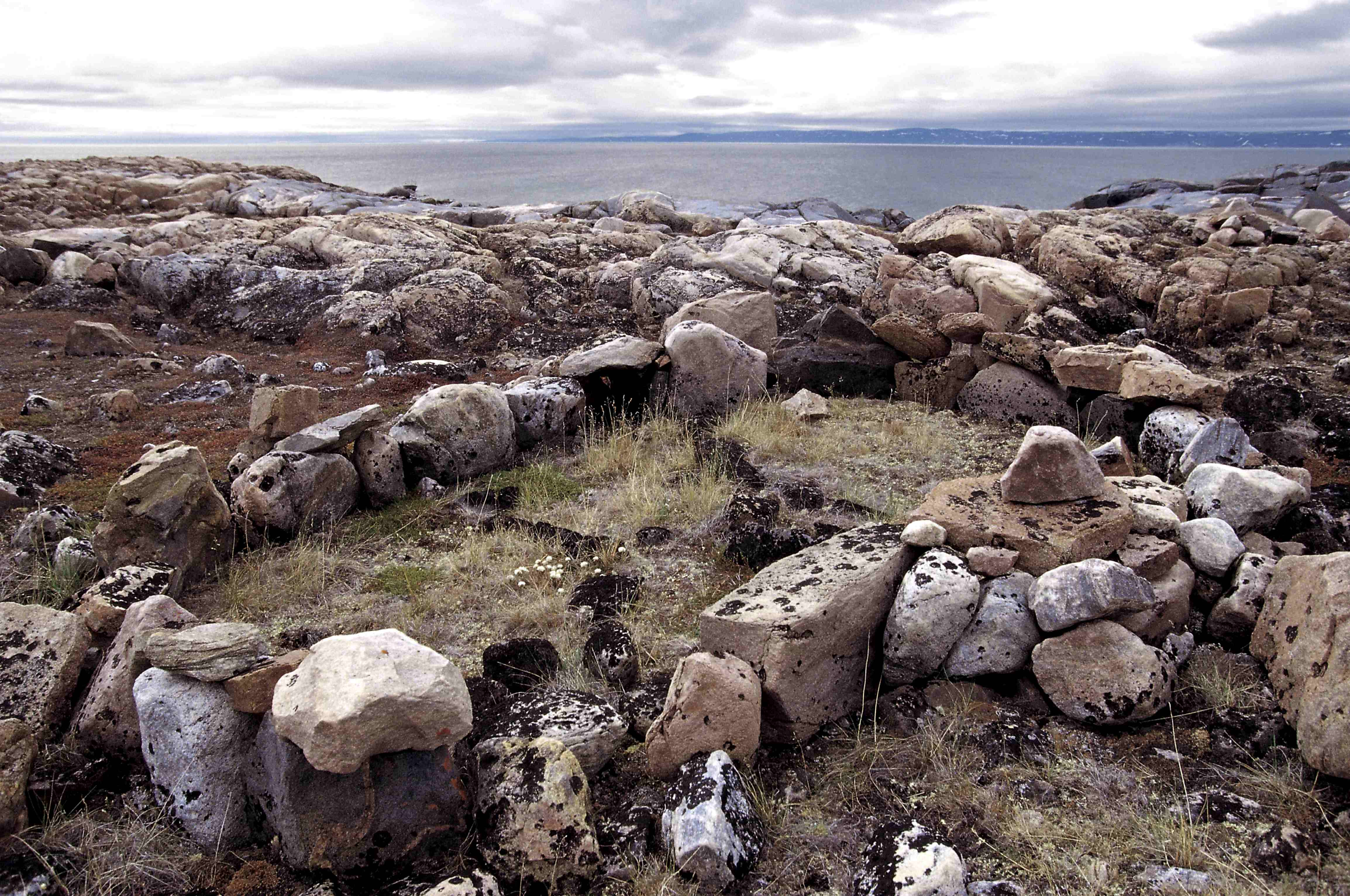 Qarmaq_relicts (Thule site) (Ukkusiksalik National Park, Nunavut, Canada)